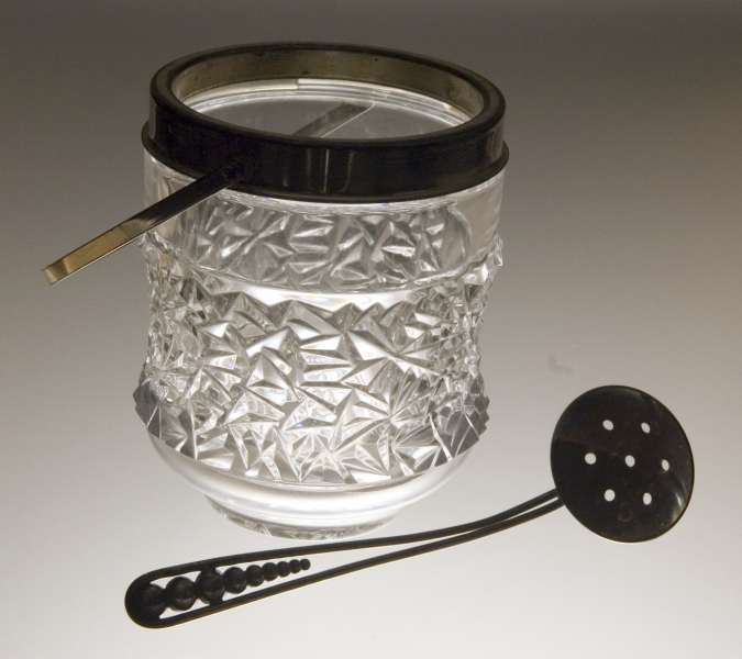 Isbøtte fra ca 1960 i glass med hank og tilhørende øse i metall. Diameter 11 cm. Foto Anne-Lise Reinsfelt / Norsk Folkemuseum. NF 2002-0592AB.